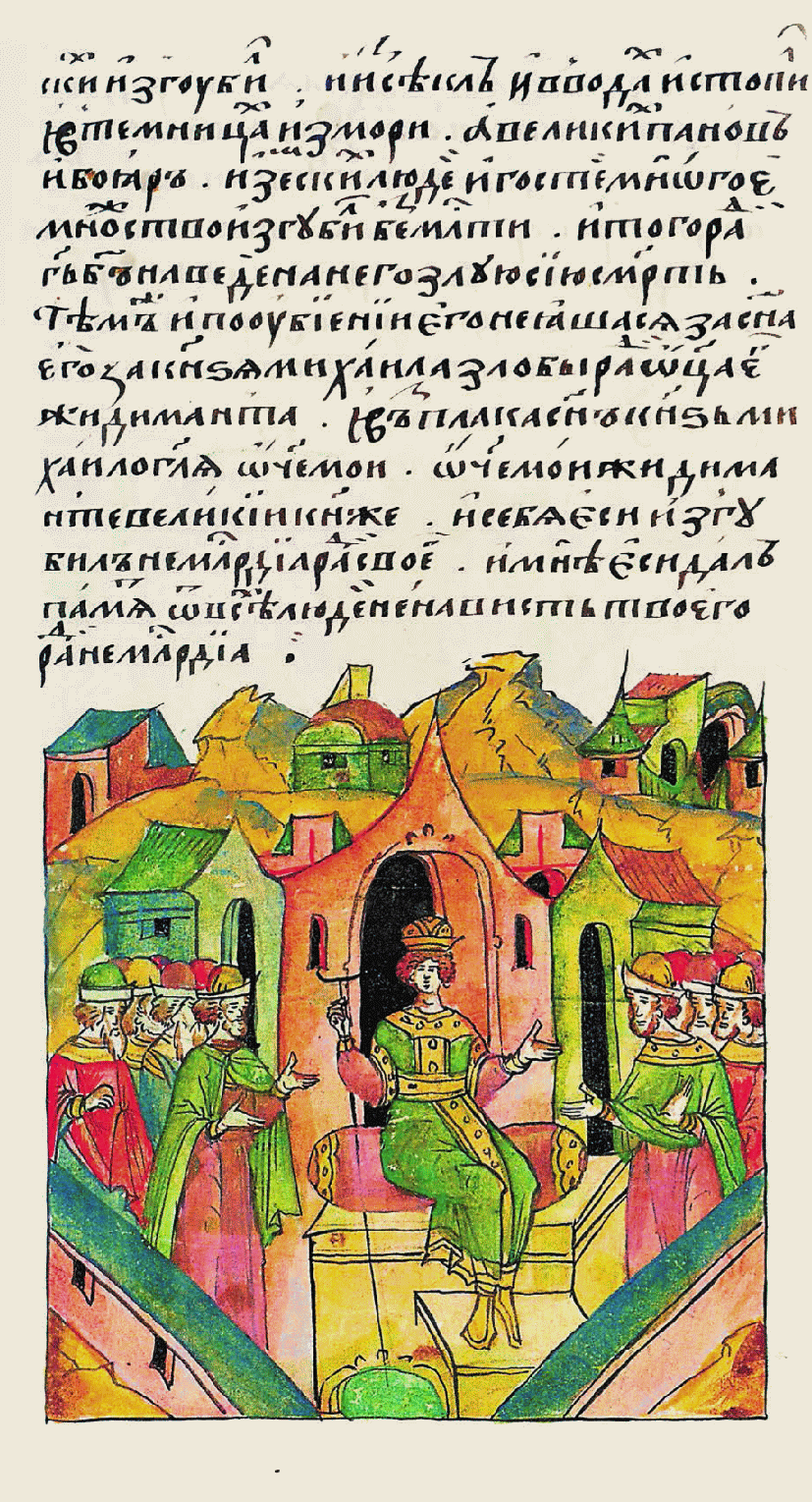 погубил, порубил и в водах утопил, в темницах уморил; а великих панов и бояр, земских людей и гостей множество погубил без милости; и поэтому Господь Бог наказал его злой смертью. После его убийства не позаботи- лись о его сыне князе Михаиле из-за злобы его отца Сигизмунда. И заплакал его сын князь Михаил, говоря: «Отец мой Сигизмунд, великий князь! И себя погубил из-за своей жестокости, и мне оставил ненависть всех людей из-за свое- го бессердечия».